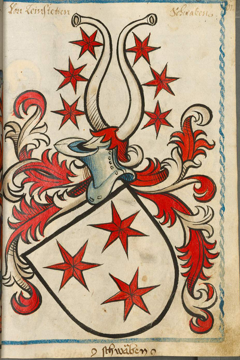 Scheibler'sches Wappenbuch, älterer Teil Leinstetten